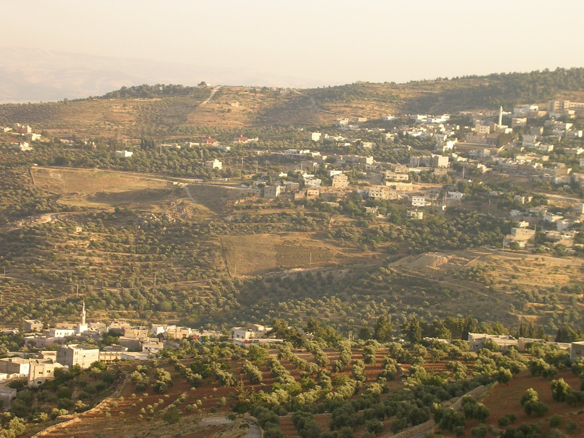 Mwaffaq Otoom